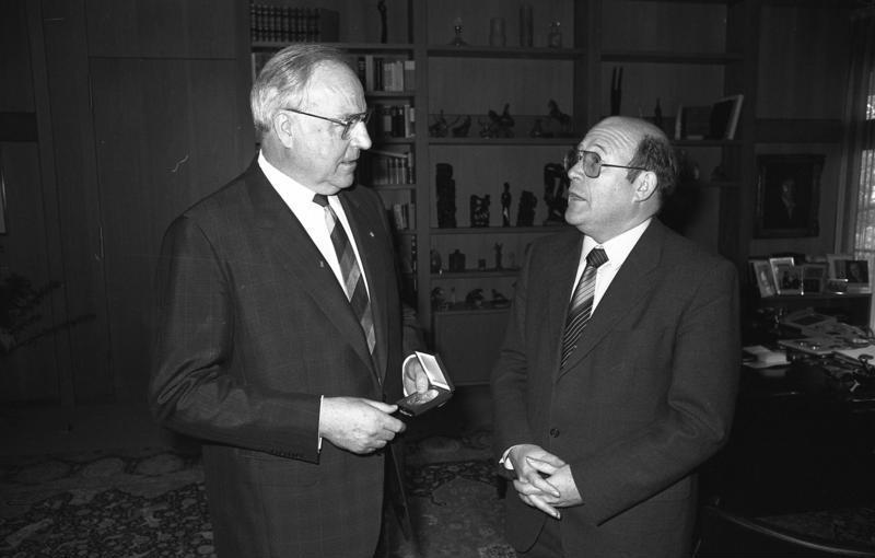 17.6.1987 Mitglied des Bundestages, Dr. Wolfgang Bötsch, CSU, überreicht Bundeskanzler Helmut Kohl die Lebensrettungsmedaille der Deutschen Lebensrettungs-Gesellschaft (DLRG), Landesverband Bayern, als Dank für das Schreiben eines Vorwortes der Festschrift zu DLRG-Feierlichkeiten in Augsburg im April 1987 - im Bundeskanzler-Amt